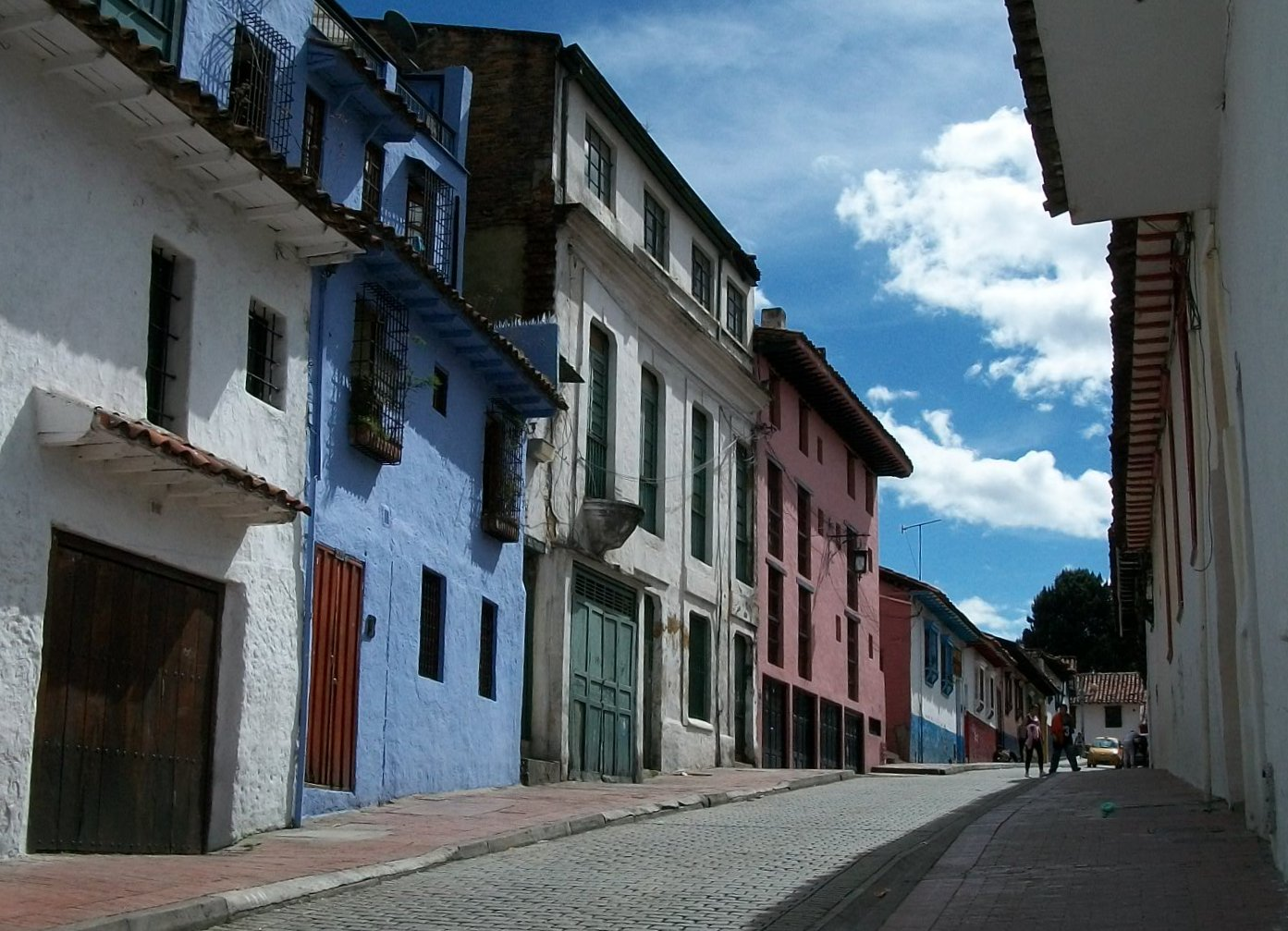 Zona alta del barrio La Candelaria, en Bogotá. Calle 2 con calle 10.